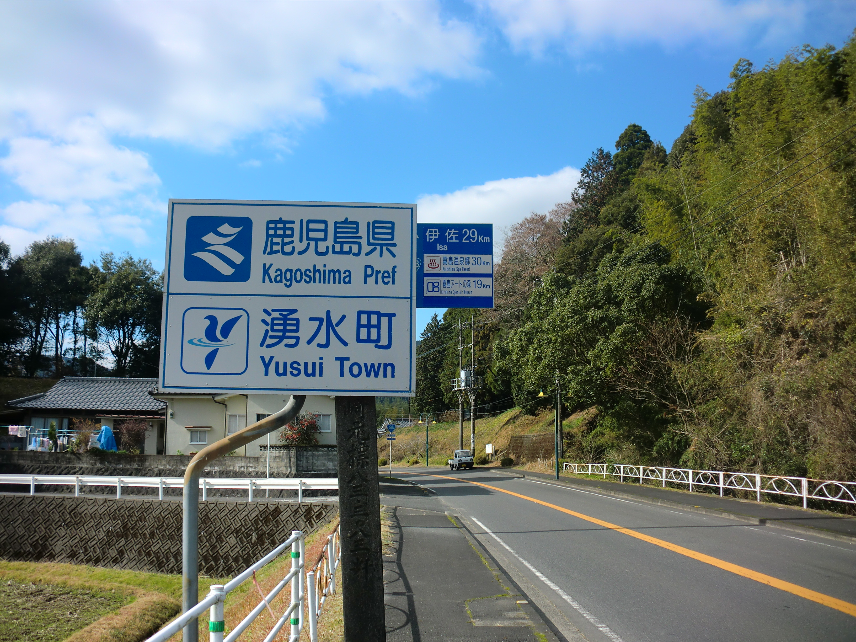 国道268号線にある宮崎県えびの市と鹿児島県姶良郡湧水町の境界